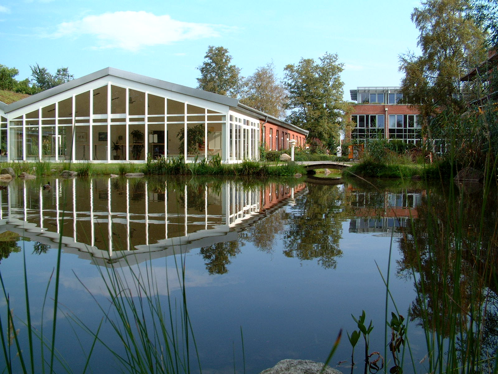 Foyer und Sicht übern See der Nordakademie